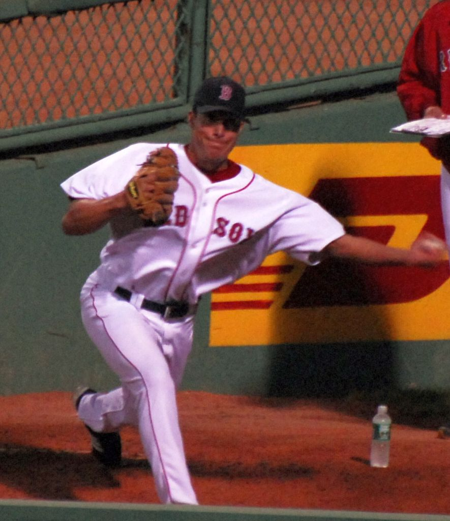 Javier López